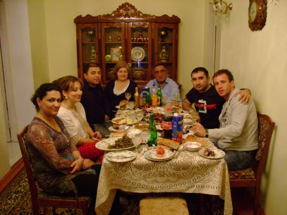 Branimir Subashich